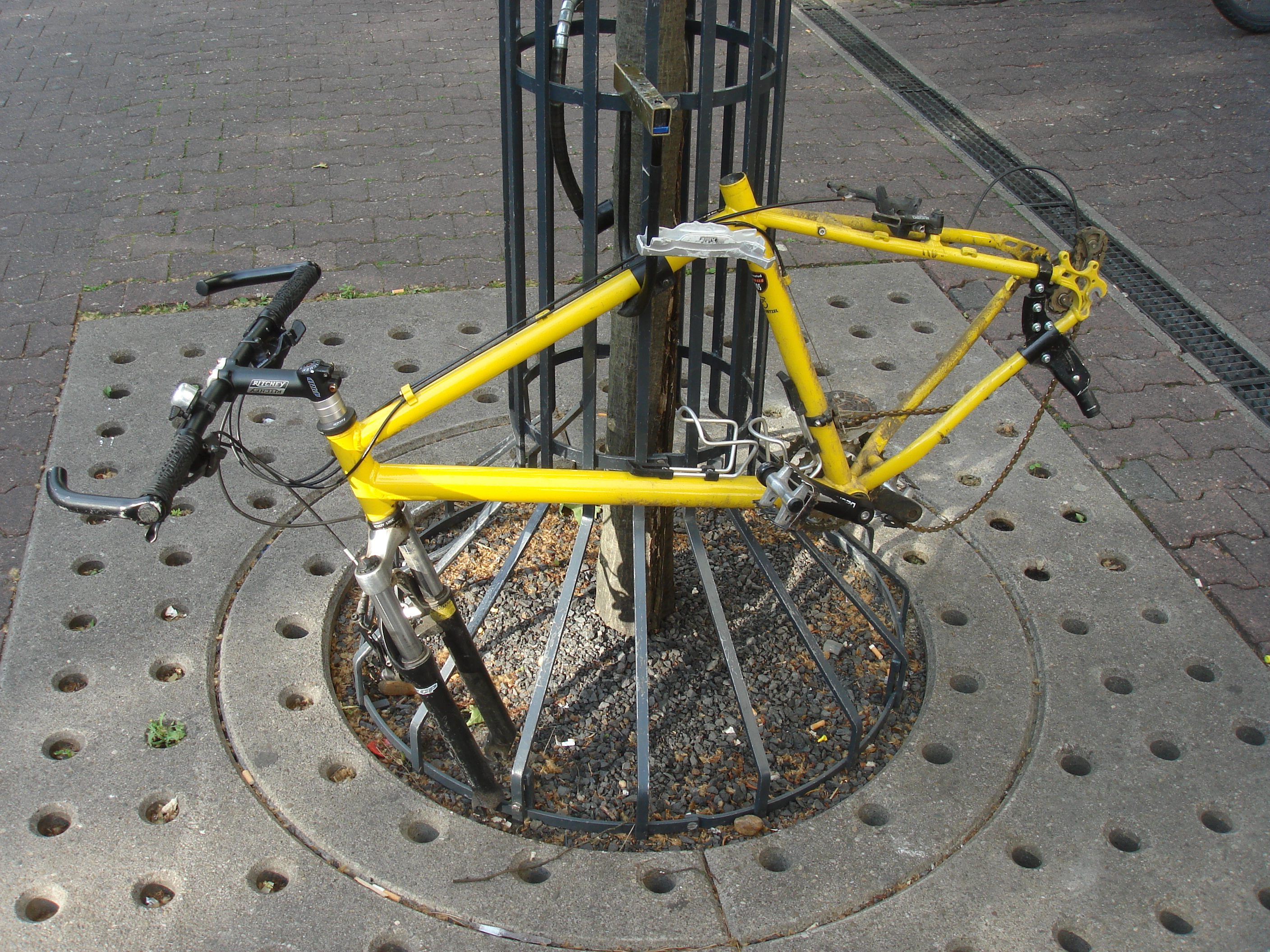 Demontiertes Fahrrad, Diebstahl, bike missing stolen parts